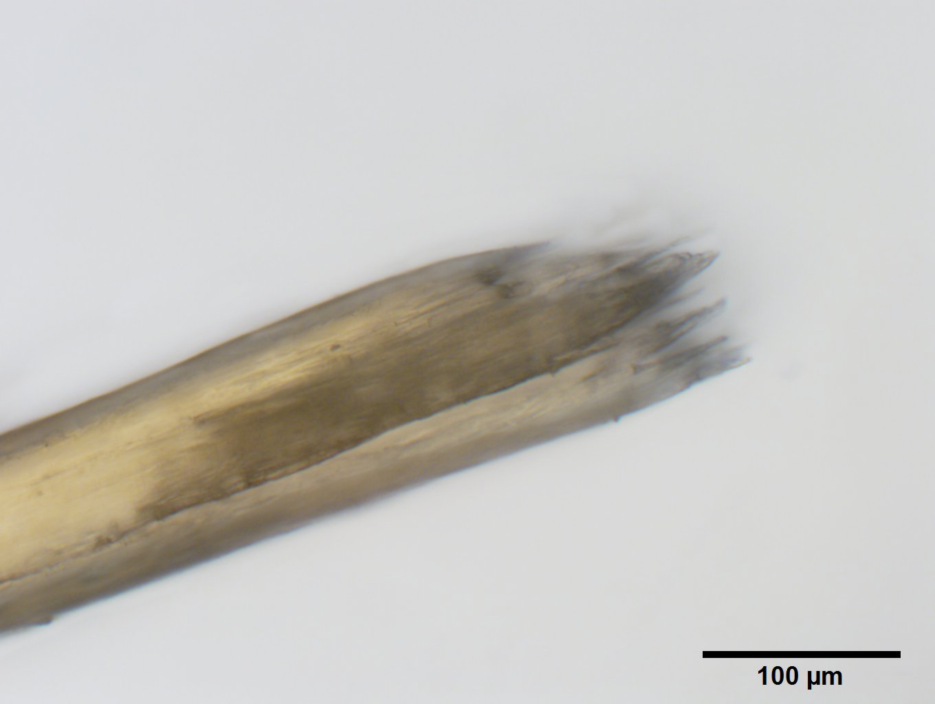 Eine beginnende Spaltung des Haares